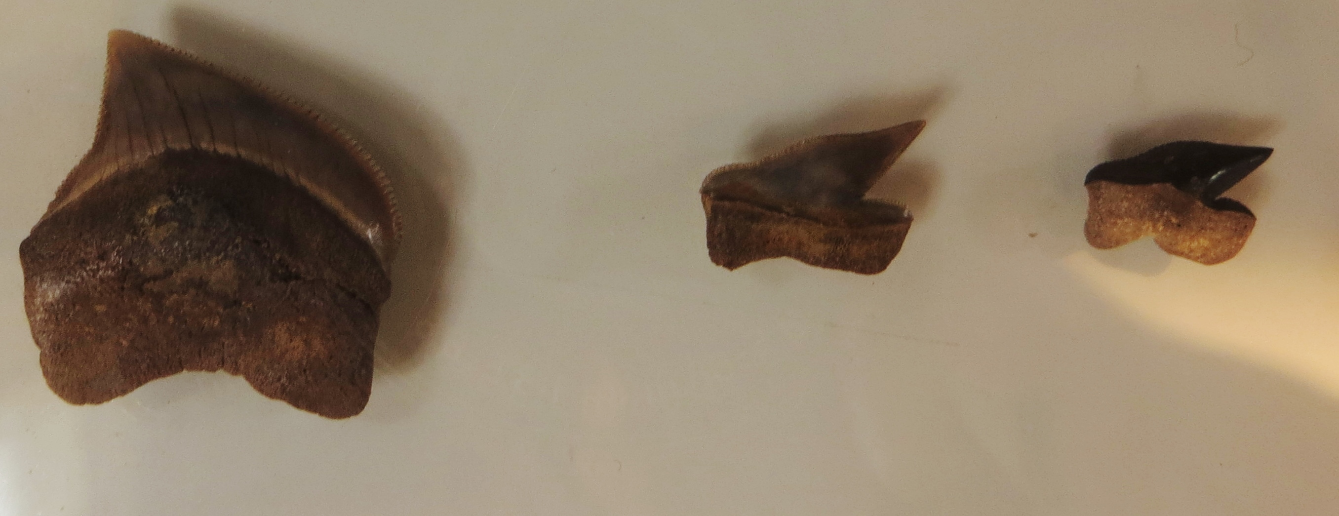 Fossil of Pseudocorax - Took the picture at Naturalis, Leiden